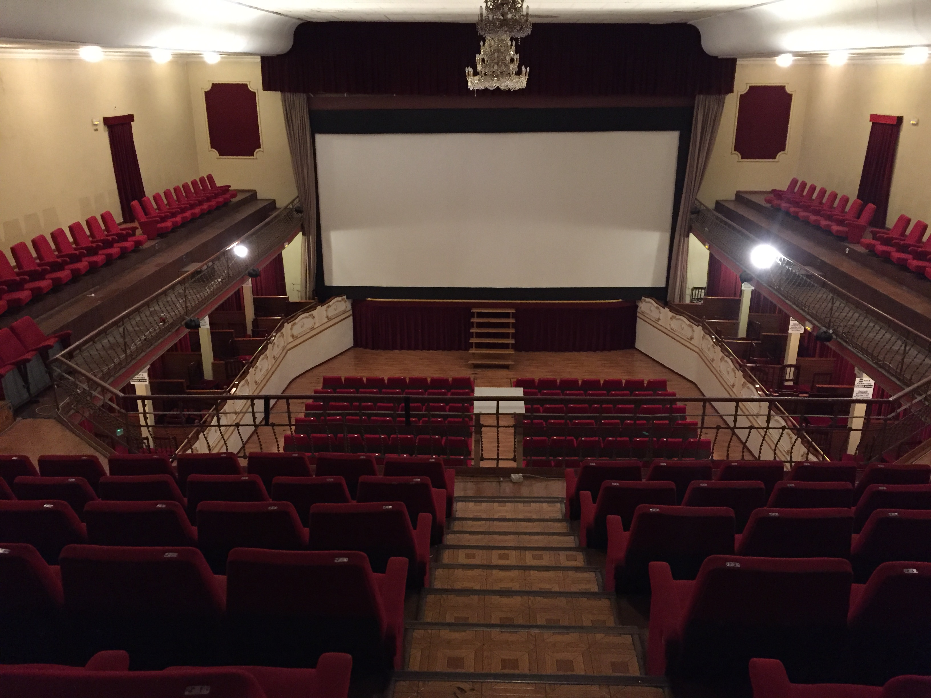 vista desde la grada superior del interior de la sala.